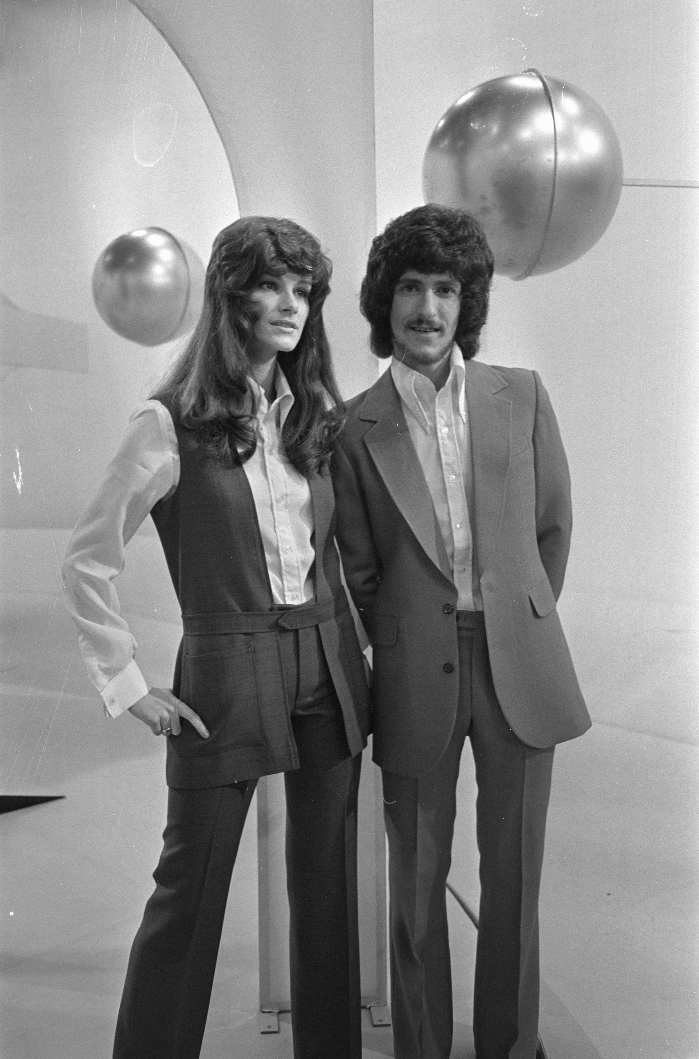 Collectie / Archief : Fotocollectie Anefo Reportage / Serie : [ onbekend ] Beschrijving : Nationale finale Eurovisie Songfestival ; voorbereiding: Saskia en Serge , kop Datum : 23 februari 1971 Trefwoorden : songfestivals Fotograaf : Peters, Hans / Anefo Auteursrechthebbende : Nationaal Archief Materiaalsoort : Negatief (zwart/wit) Nummer archiefinventaris : bekijk toegang 2.24.01.05 Bestanddeelnummer : 924-2949